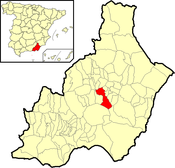 Situación del término municipal de Tahal respecto a la provincia de Almería, en España.